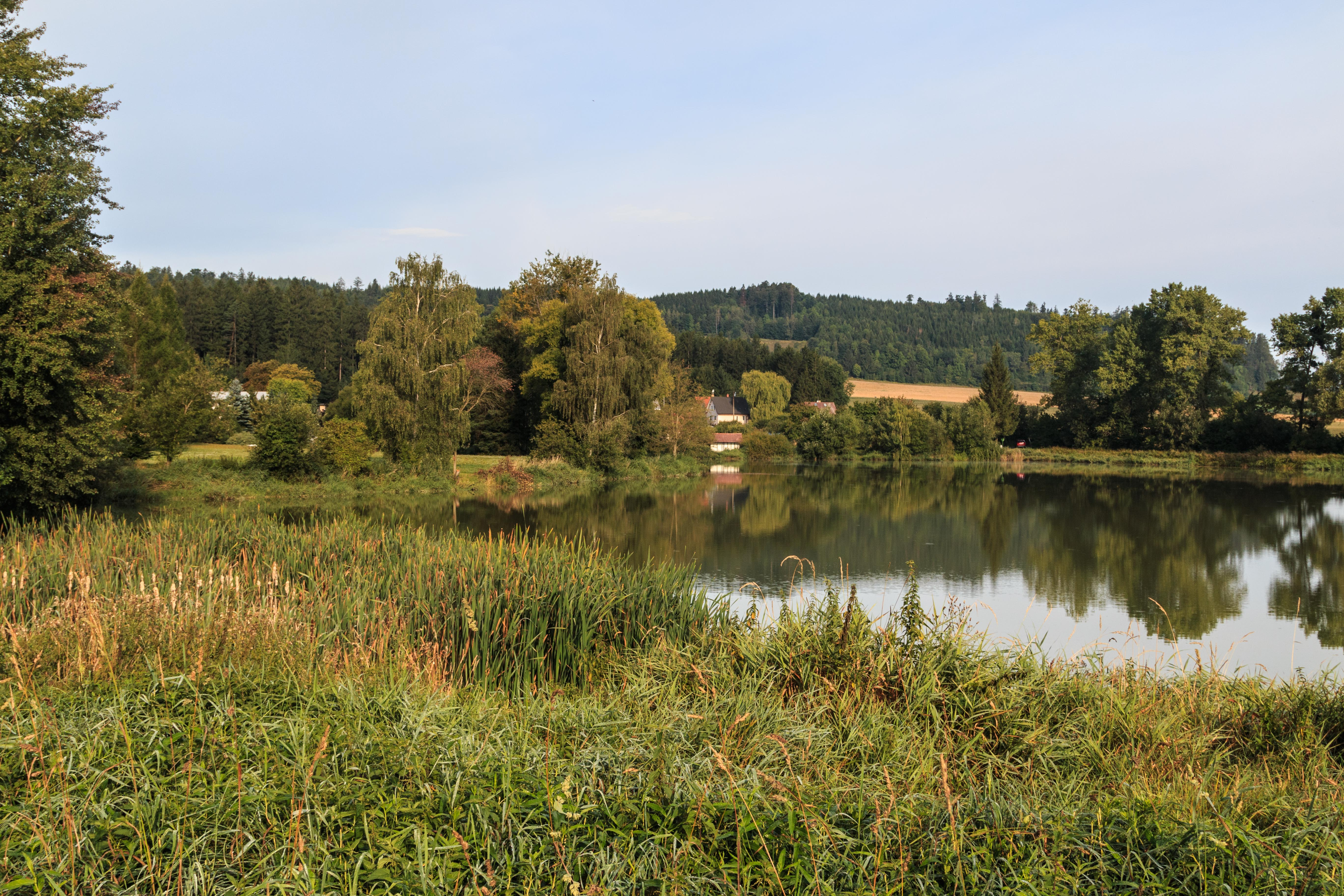 Dolní Přívratský rybník